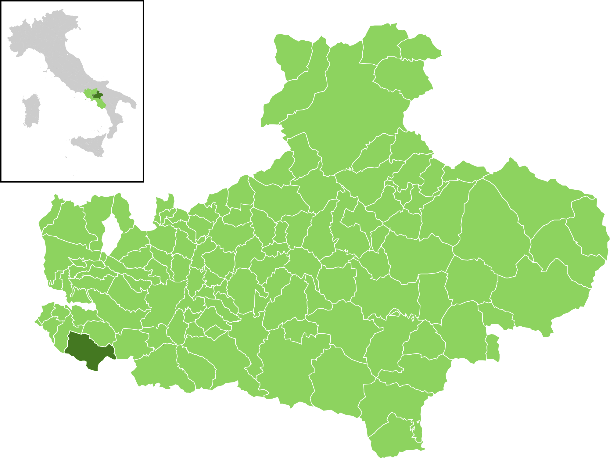 Posizione del comune all'interno della provincia di Avellino